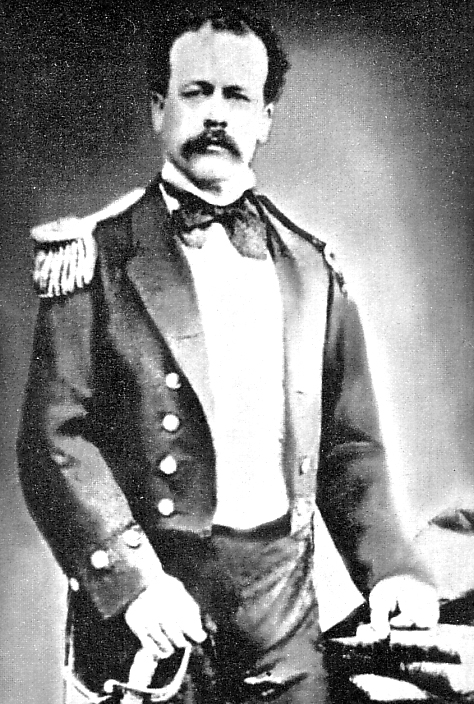 Aurelio García y García,(1836 - 1888), contralmirante de la marina peruana.